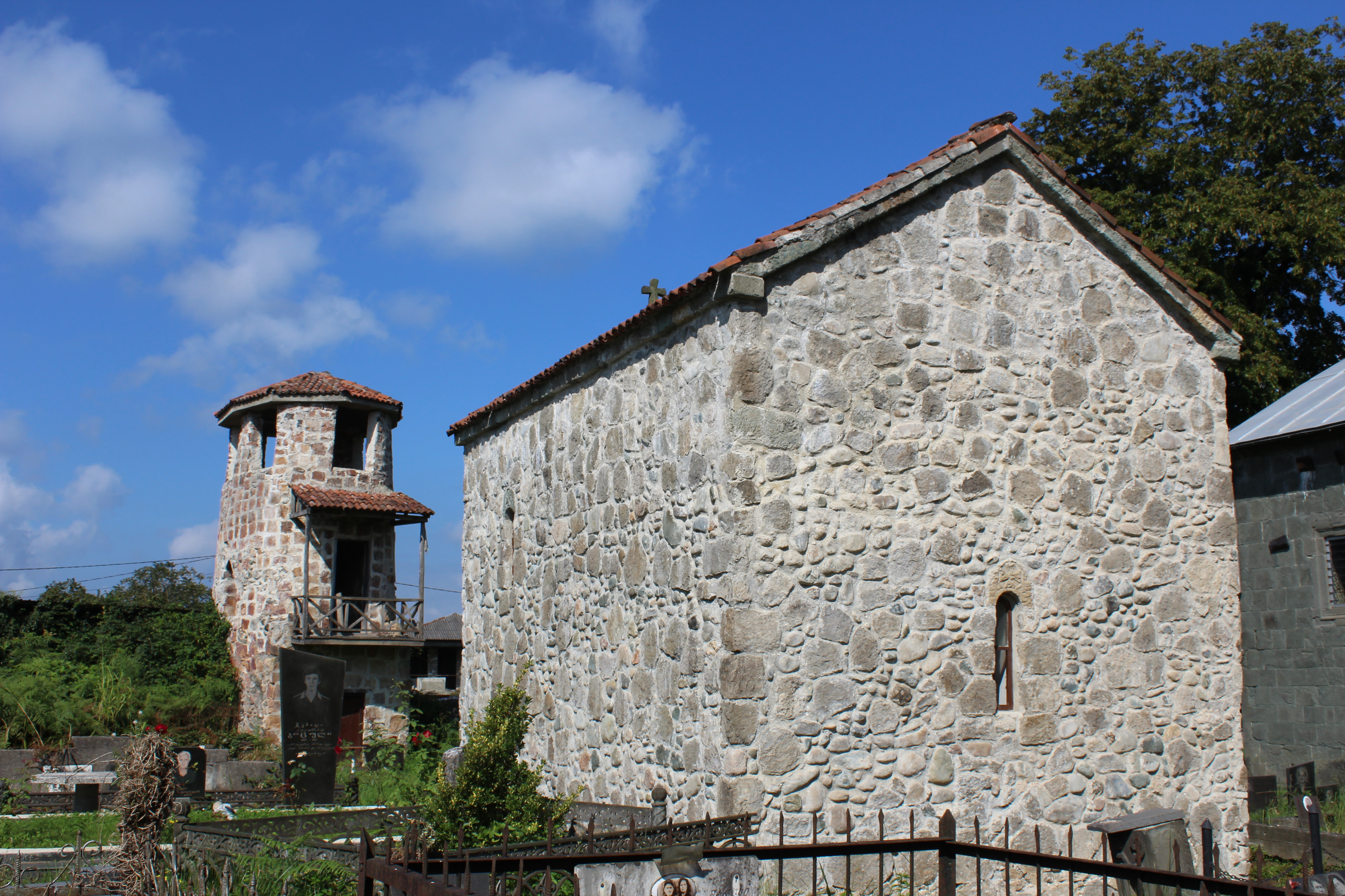 დვაბზუს XIX საუკუნის ეკლესია